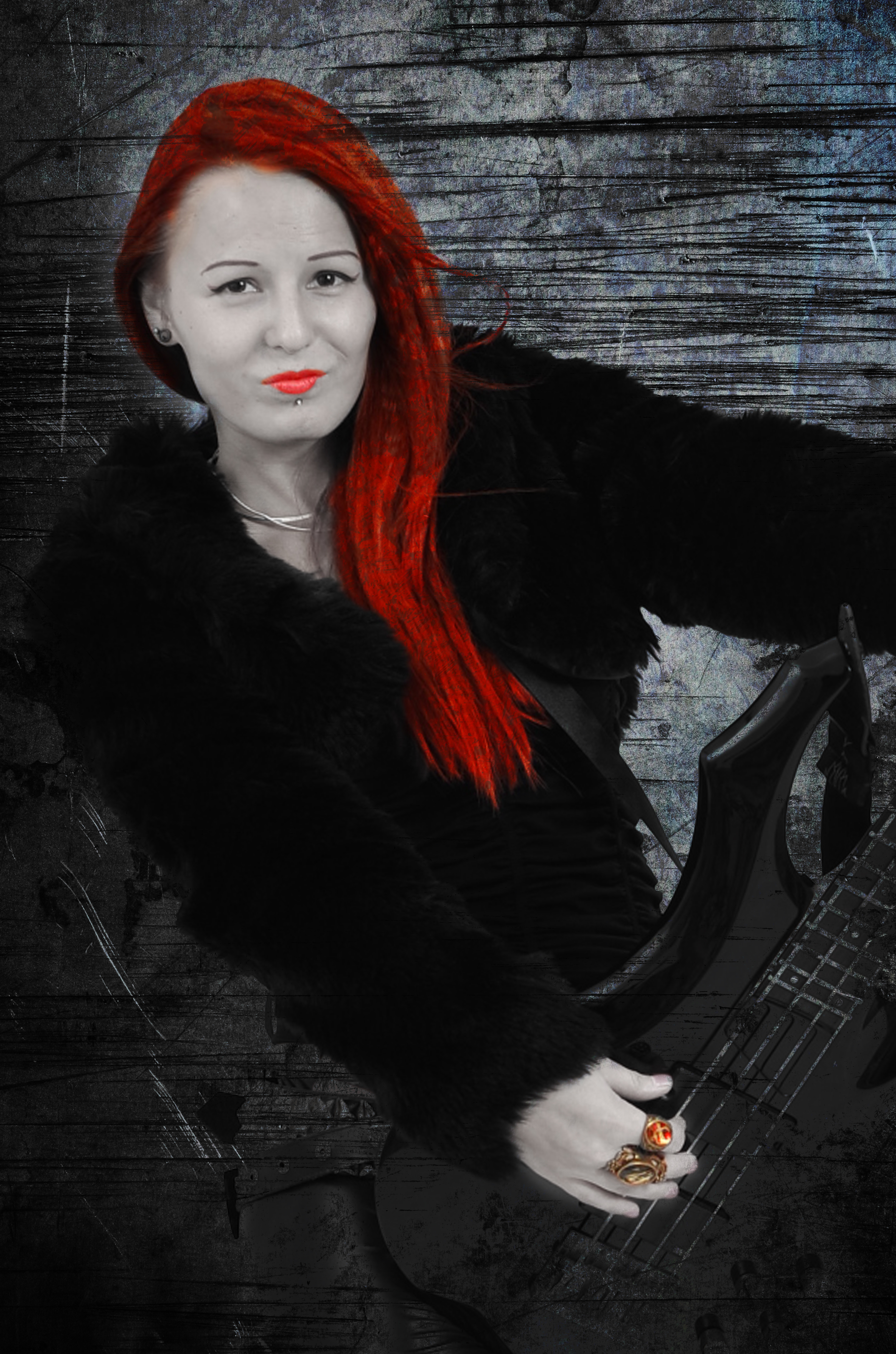 tonka